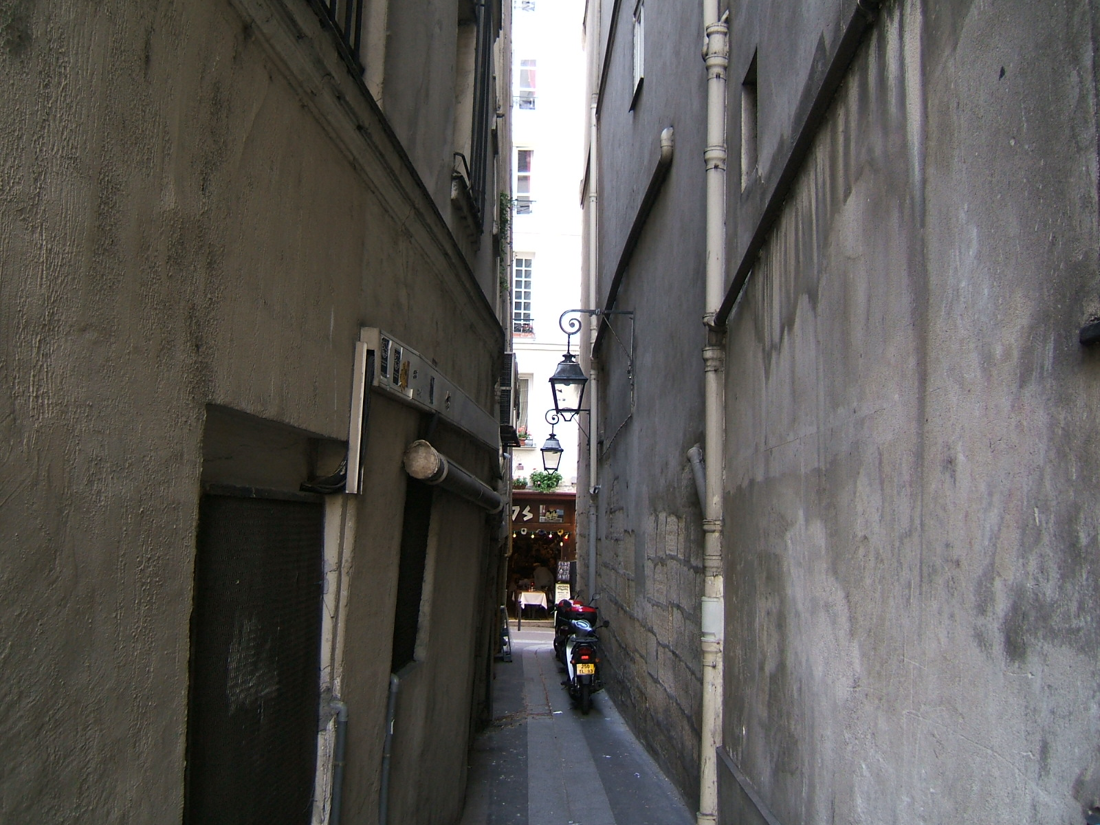 Rue du Chat-qui-Pêche (Paris)